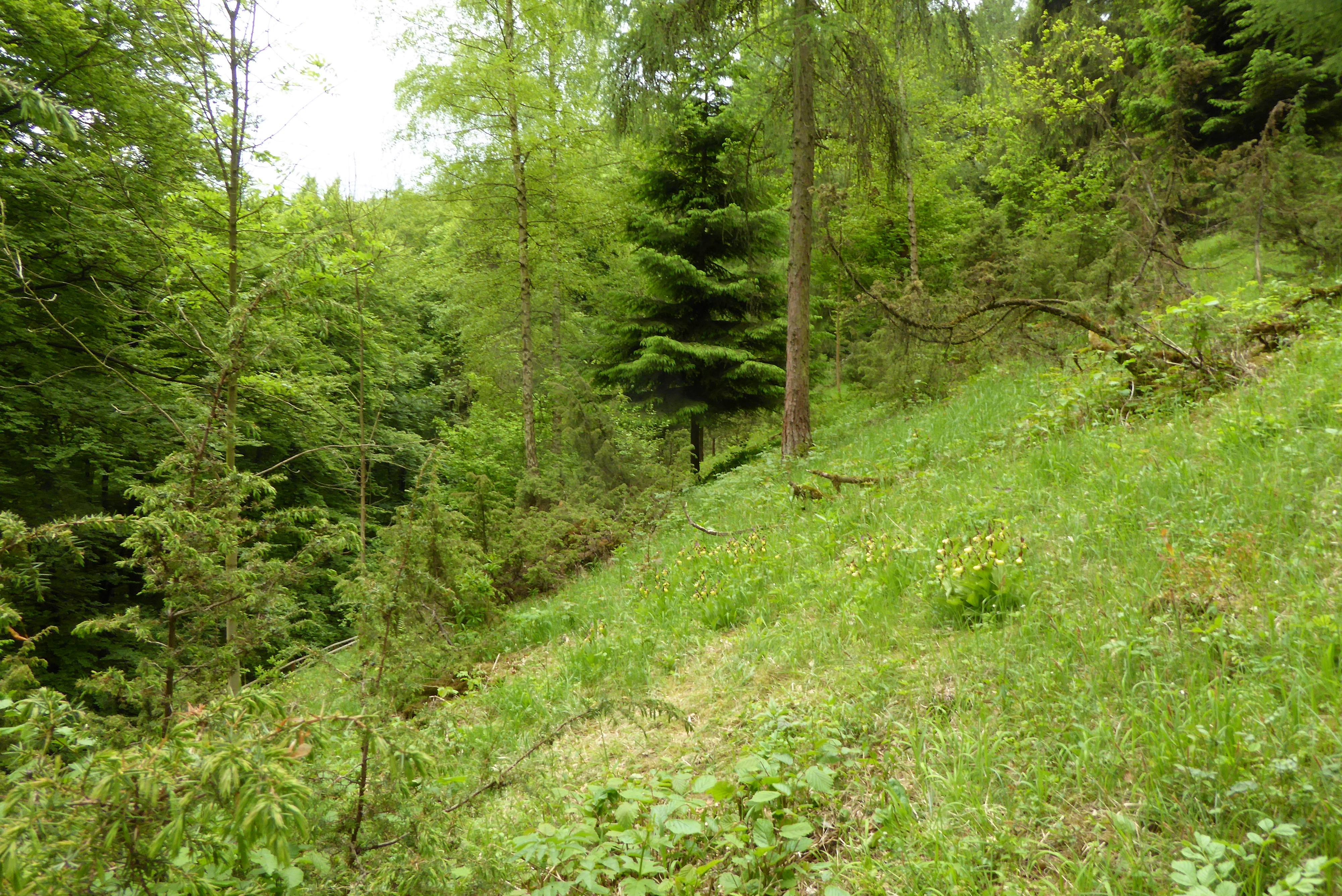 Frauenschuhwiese oder Orchideenwiese am Nordhang des Burgbergs im Naturpark Solling-Vogler, Landschaftsschutzgebiet Solling-Vogler, Landkreis Holzminden